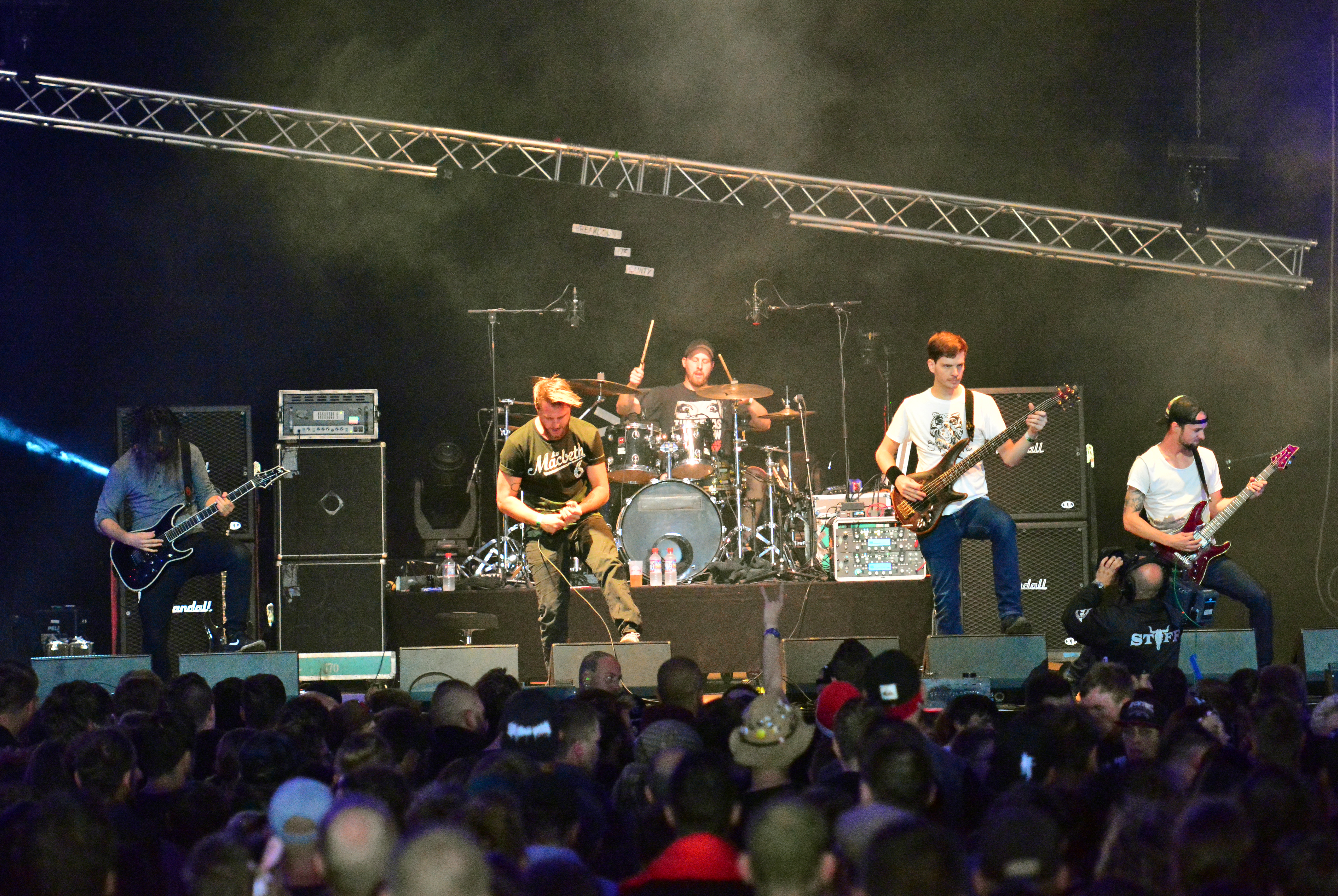 Breakdown of Sanity beim Wacken Open Air 2015